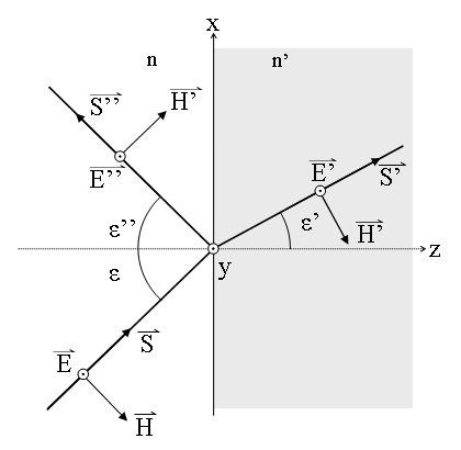 representación de difracción y reflexión. E _|_ al plano de incidencia. Ley de Fresnel. Fresnel Law.